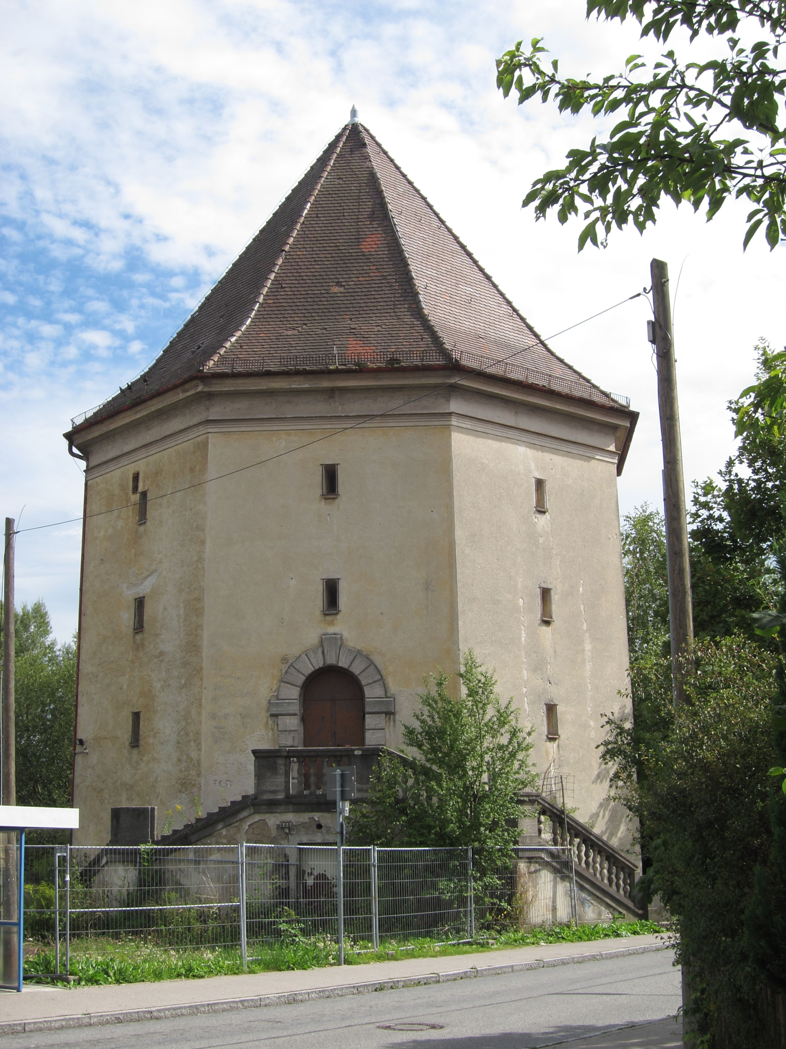 Hochbunker in München-Allach, Lautenschlägerstraße Ecke Oertelplatz